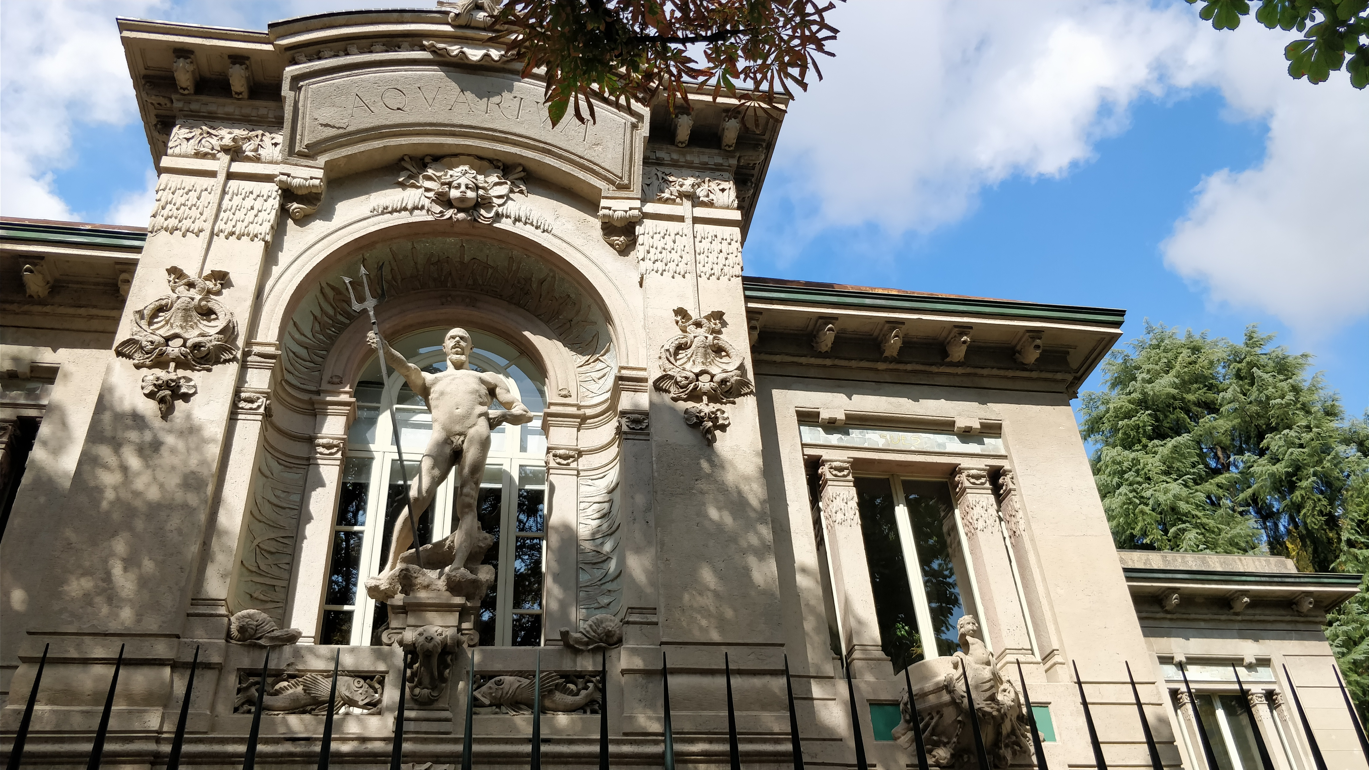 Facciata dell'Acquario e Civica Stazione Idrobiologica Milano This is a photo of a monument which is part of cultural heritage of Italy.